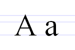 Cyrylickie A.